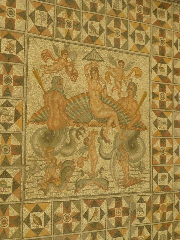 La mosaïque de « Venus sortant du bain » musée de Sétif